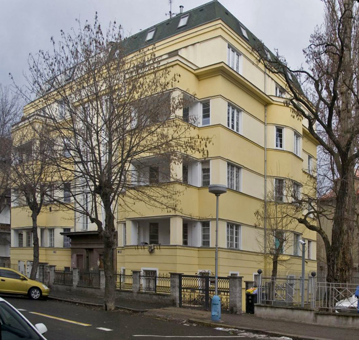 Doppel-Wohnhaus in Teplitz (Teplice, Kollárova 5–7), errichtet 1930, Architekt: Max von Loos, Expressionismus.